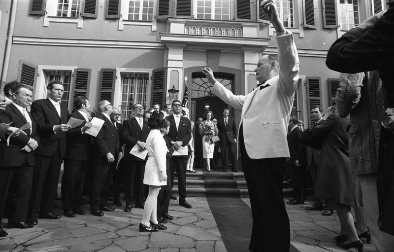 Staatsbesuch des belgischen Königspaares Abendempfang in der Commende mit dem Gesangverein aus Muffendorf